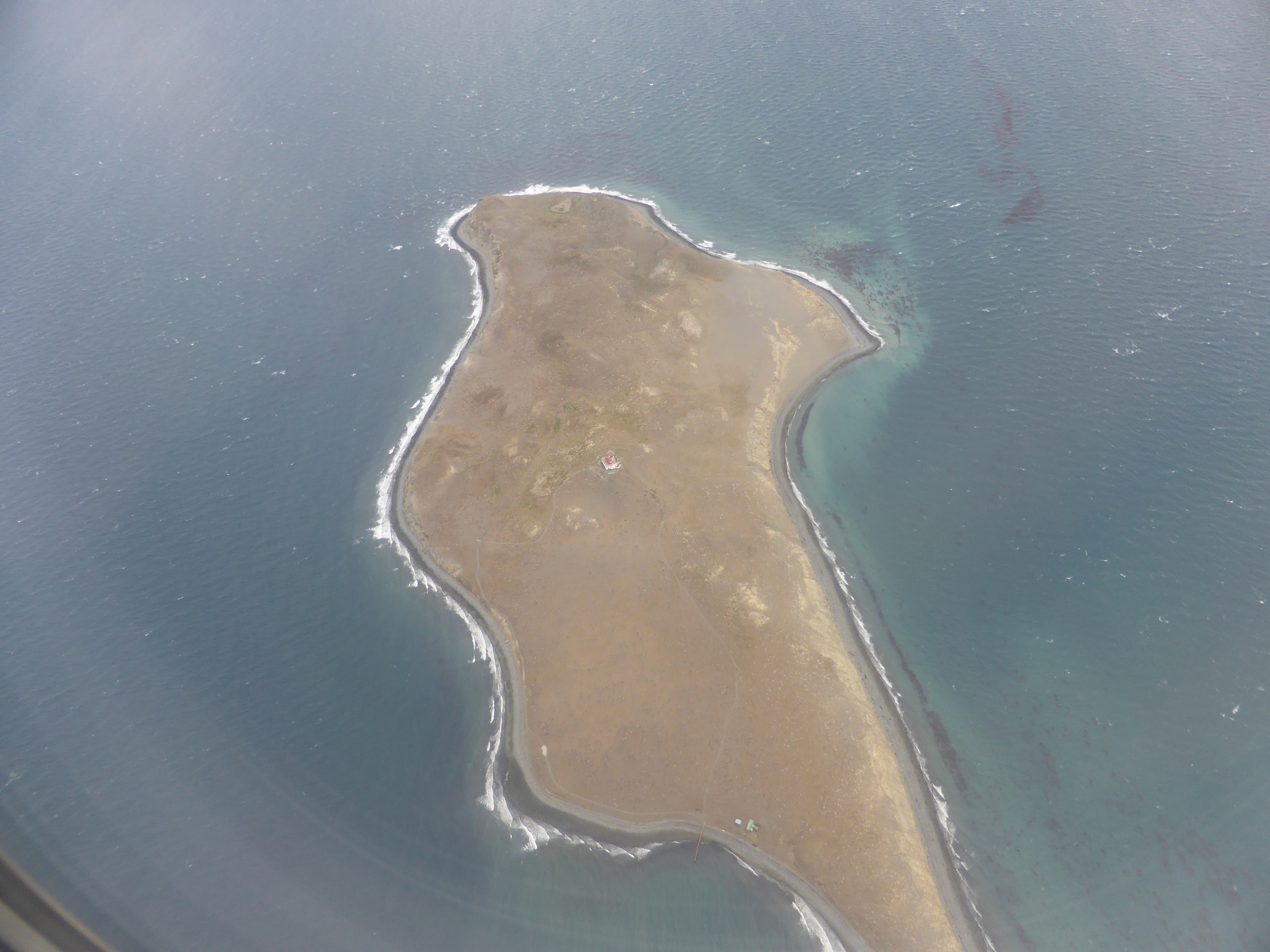 La isla Magdalena se encuentra en el Estrecho de Magallanes. Es una isla donde anidan miles de pingüinos magallánicos (Spheniscus magellanicus). En la fotografía, tomada desde un avión de LATAM, con destino Punta Arenas, vemos el faro, en el centro de la isla. Y el camino del circuito del recorrido turístico.